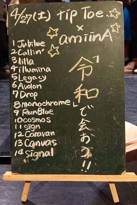 amiinAセトリボード